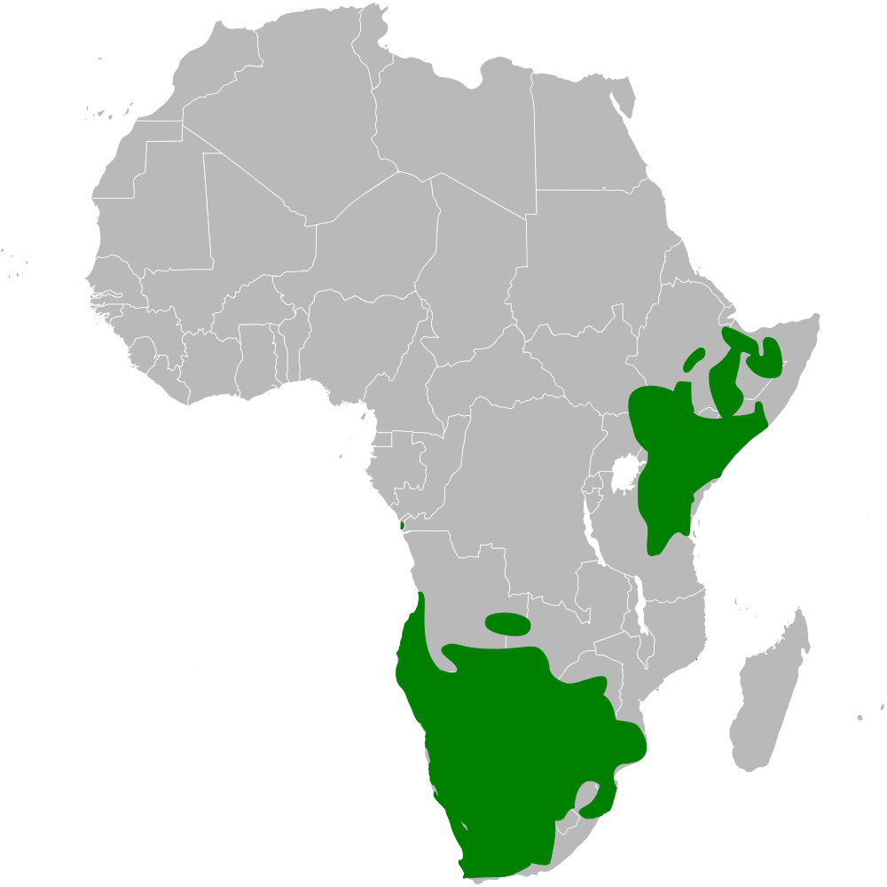 Calendulauda distribution map